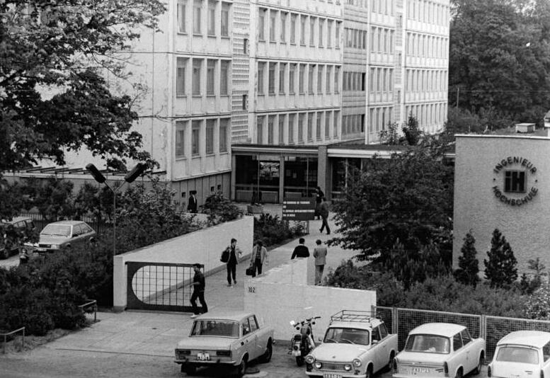 Berlin, Wartenberg, Ingenieurhochschule ADN-ZB Senft 19.6.84 Berlin: 35. Jahrestag-Entstanden in der DDR-Die Ingenieurhochschule Berlin-Wartenberg wurde am 1. September 1969 gegründet. Mit der Ausbildung von jährlich 225 Direkt- und 40 Fernstudenten in der Grundstudienrichtung "Mechanisierung der Landwirtschaft" werden mehr als 100 Jahre alte Berliner Traditionen fortgesetzt. In einem vierjährigen Direktstudium wird Facharbeitern mit Abitur ein auf hohem theoretischem Niveau stehendes, praxisorientiertes Grundlagen- und Fachwissen vermittelt. Ausbildungsziel ist das Ingenier-Diplom. Die Hochshcule arbeitet eng mit Landtechnikkombinaten und -betrieben, LPG, VEG, mit der Landmaschinenindustrie und wissenschaftlichen Einrichtungen zusammen. -siehe auch 1984-0619-14,15,17N sowie ADN-Meldung